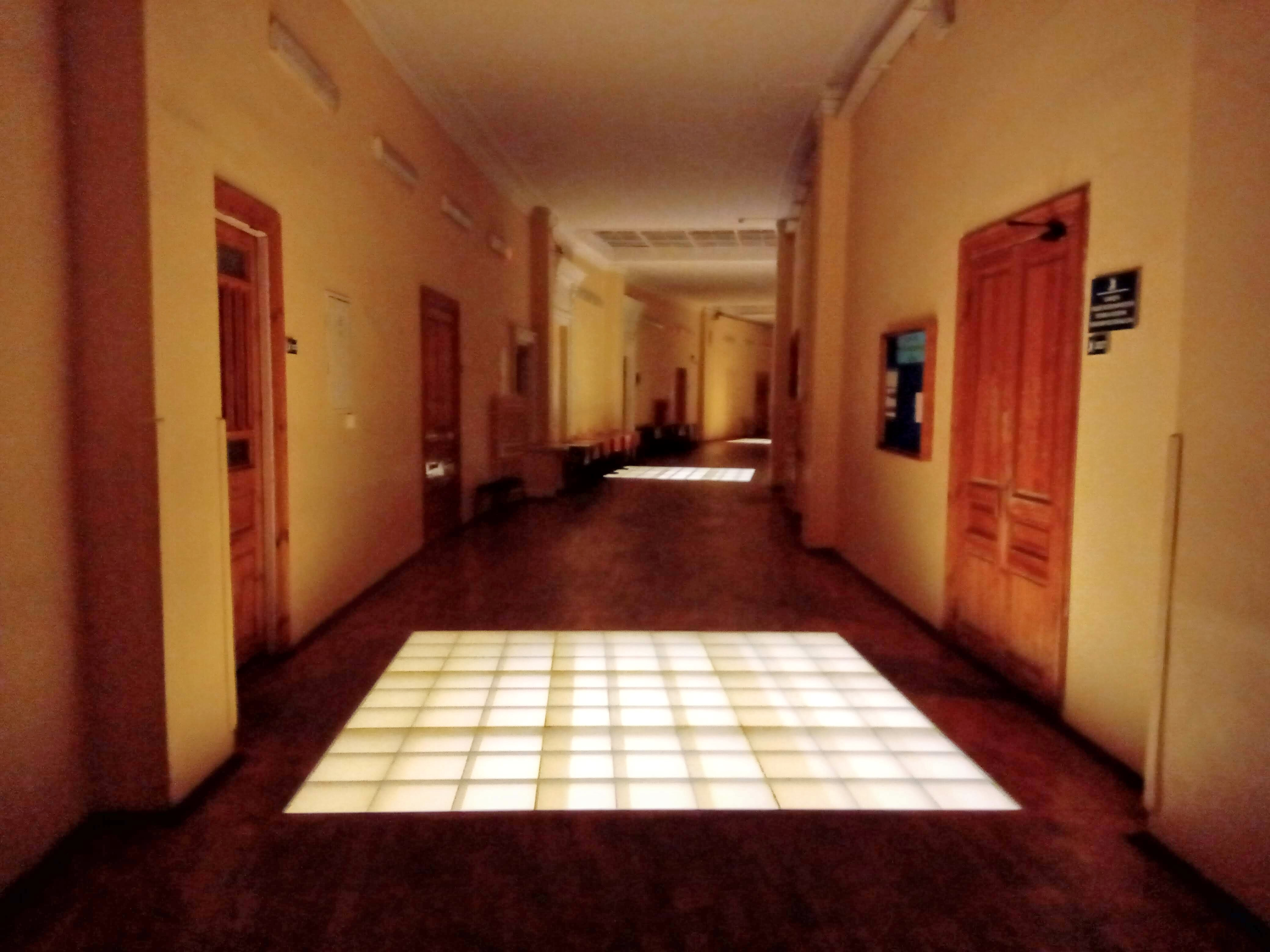 Коридоры здания Экономического университета вечером. Светящиеся квадраты на полу - "световые колодцы", сохраняющиеся с дореволюционного времени